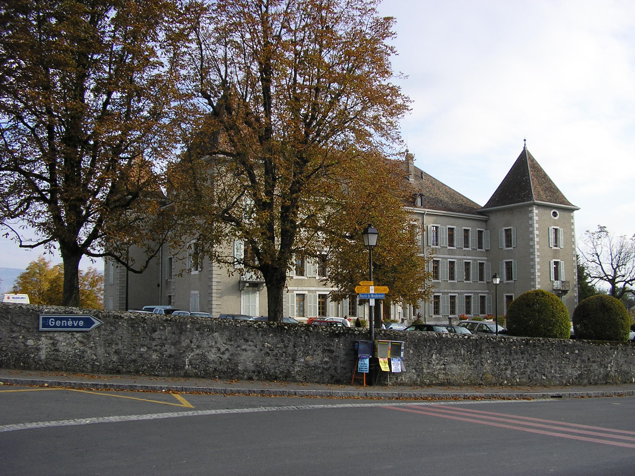 Château de Dardagny